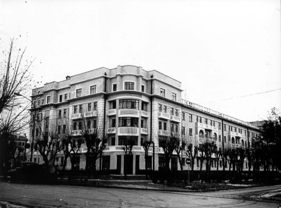 Фото 1980-х гг.